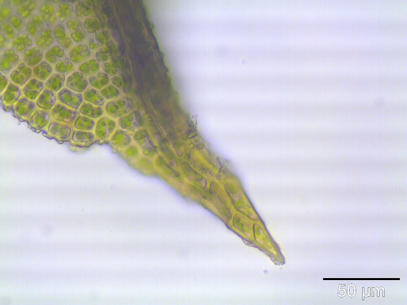 Gespitztblättriges Bärtchenmoos (Barbula unguiculata), Blattspitze, etwa 400x vergrößert